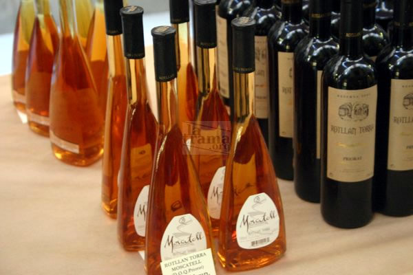 Vins moscatell exposats al Firagost de Valls, alt Camp. El Firagost es la primera fira per la difusió del mòn rural a Catalunya